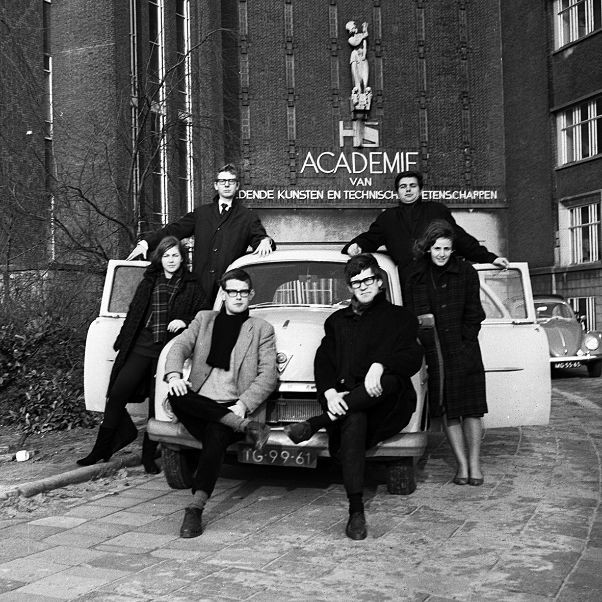 Vlnr: Francine Terlinden, Jan Veth, Vincent Mentzel, Will Bakker, Wouter Stips, Joke de Vries.